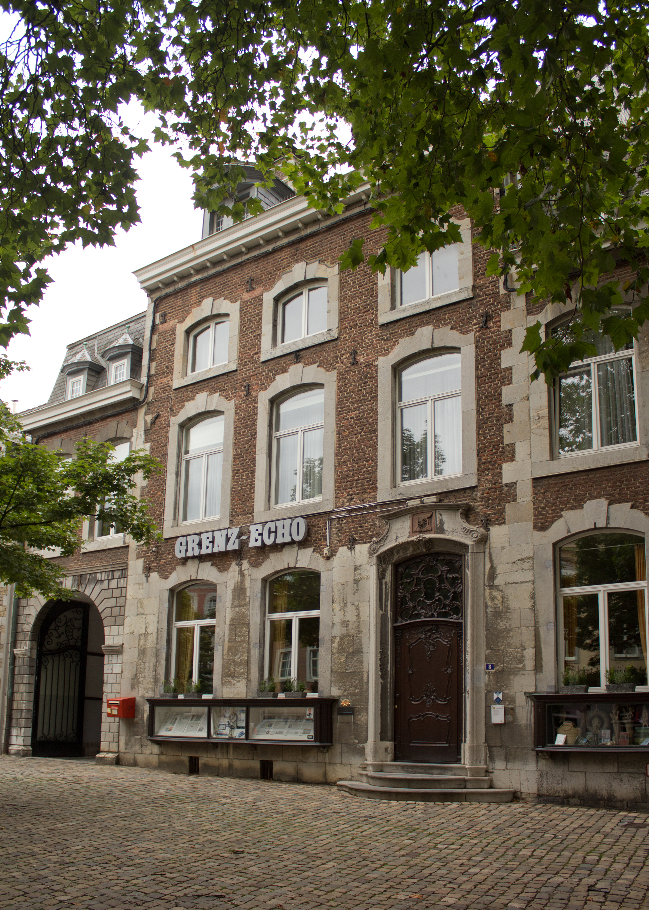 Marktplatz 8, Eupen